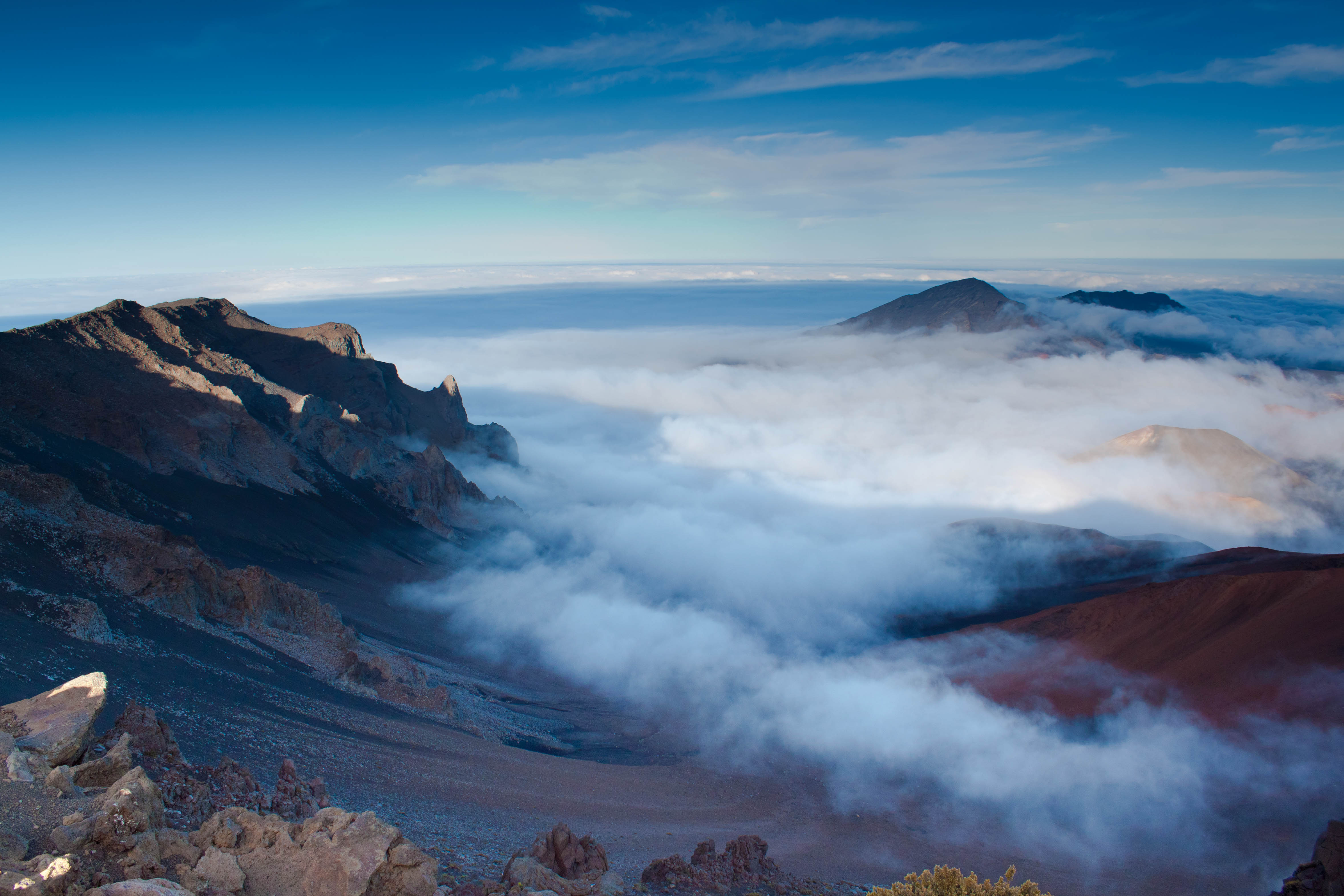 Haleakala Crater